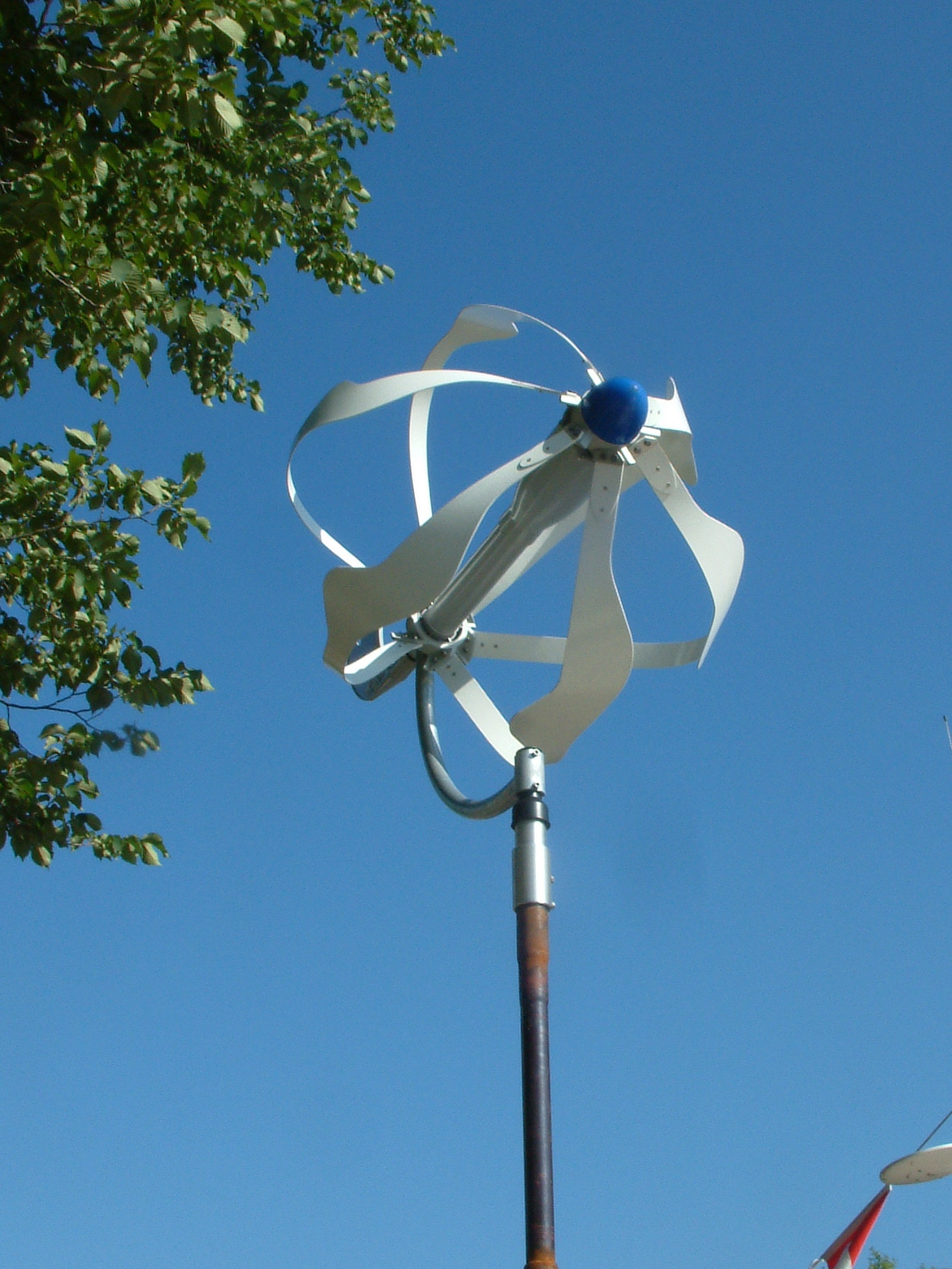 Energy Ball op een varend woonschip uit Tilburg